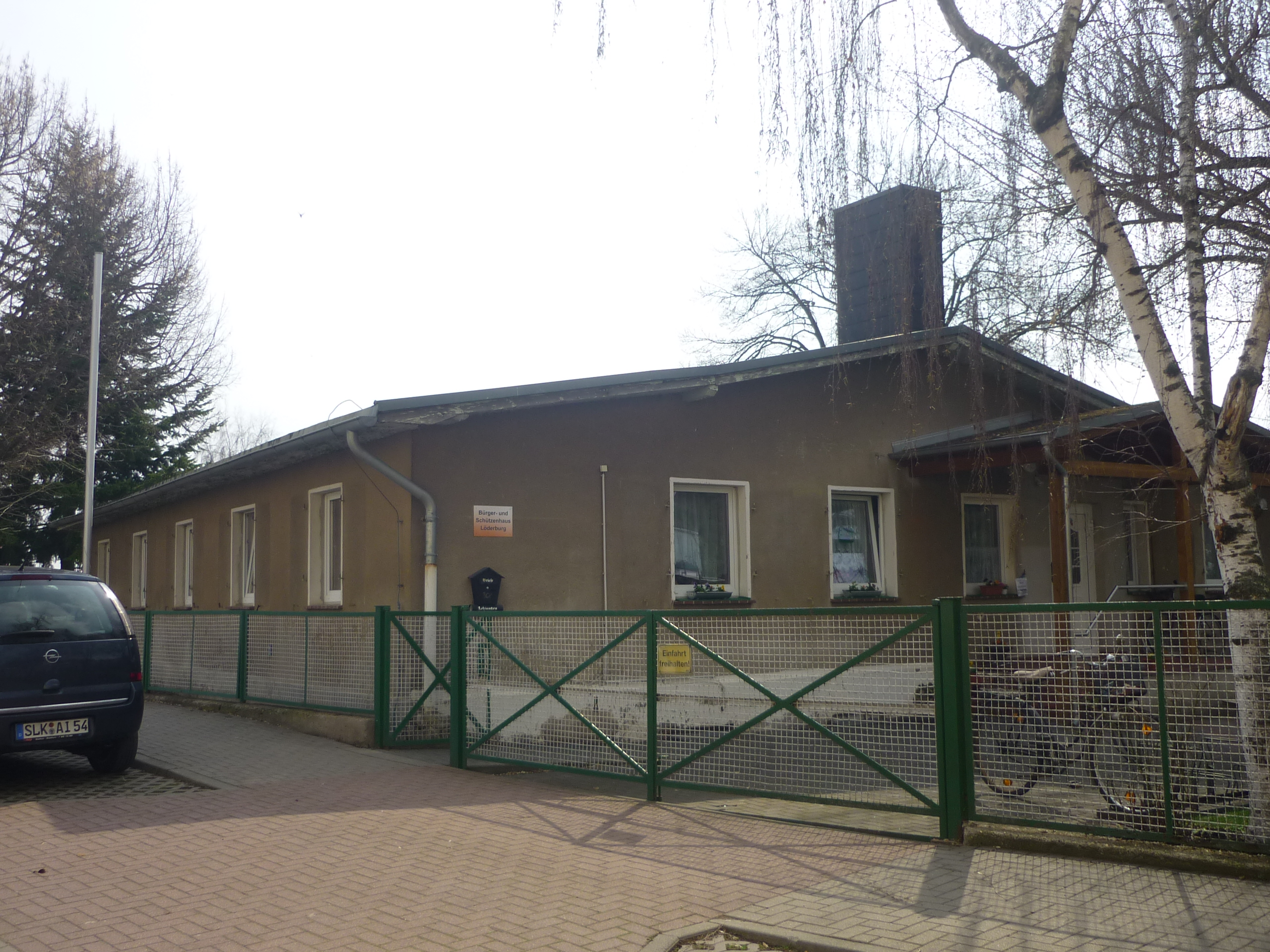 BüHaLö